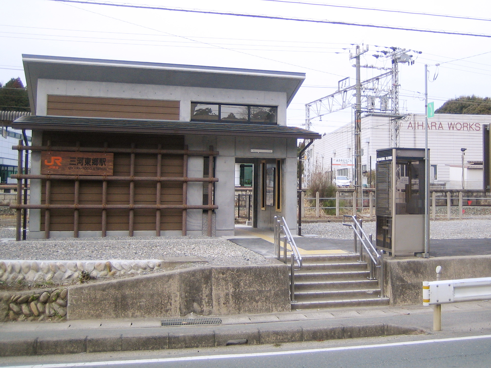 三河東郷駅。愛知県新城市Mikawa-Togo Station (三河東郷駅 Mikawa-Tōgō Eki), located in Shinshiro, Aichi, Japan